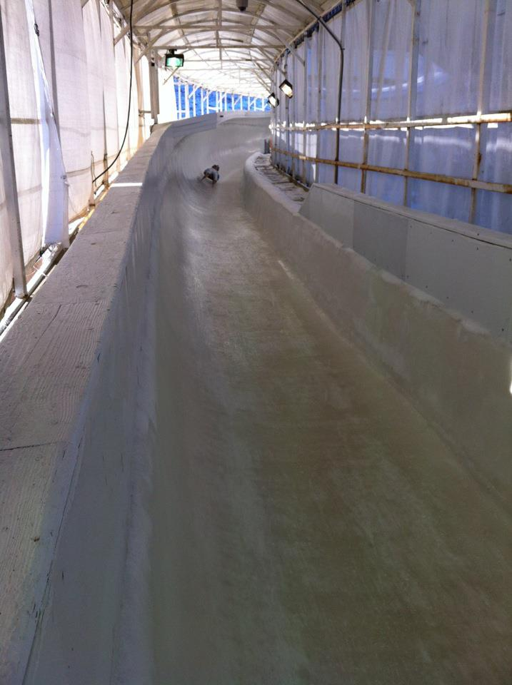 Berfin Şefkatlioglu antreman sırasında, Lake Placid, NY, U.S.A